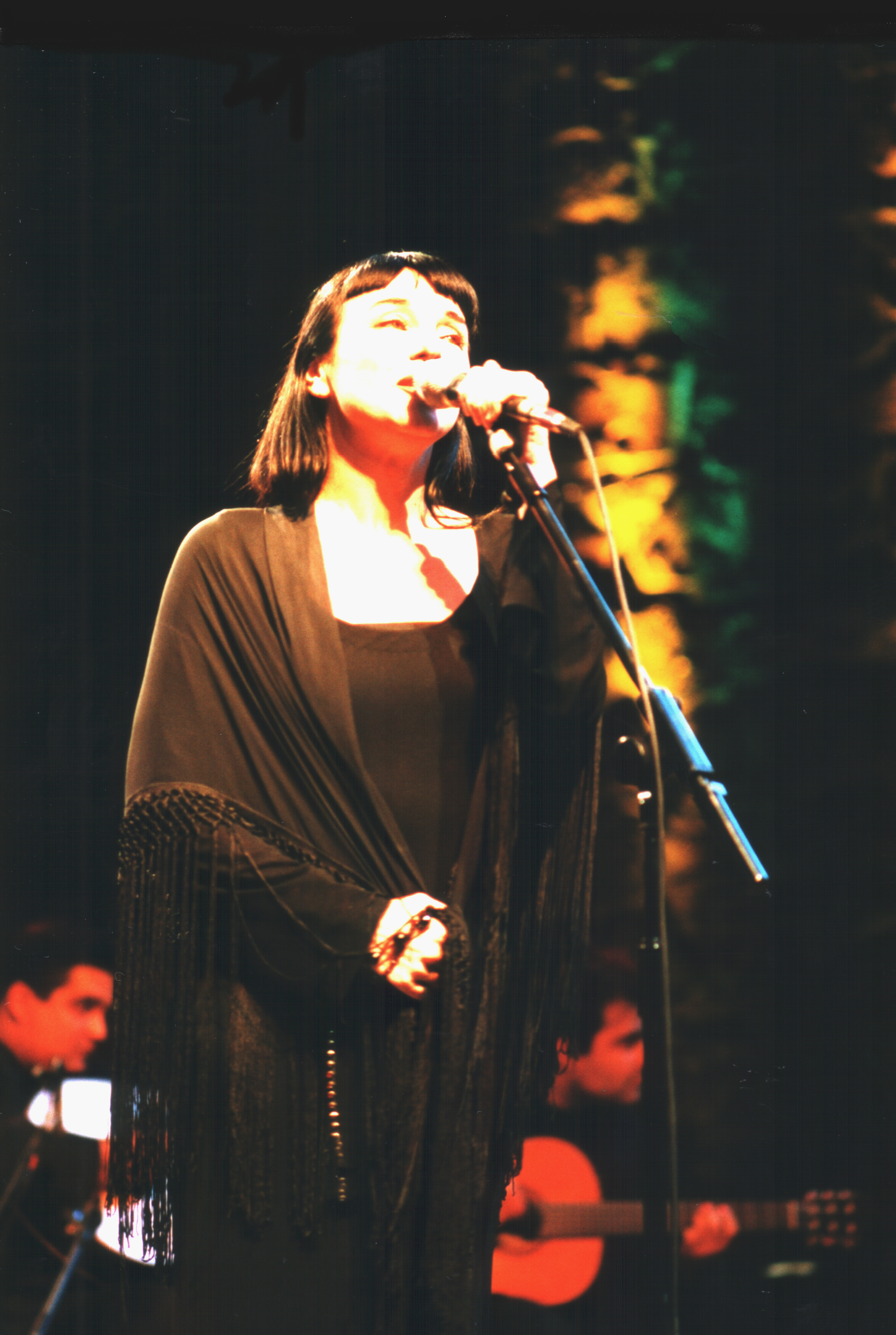 Fadista Mísia